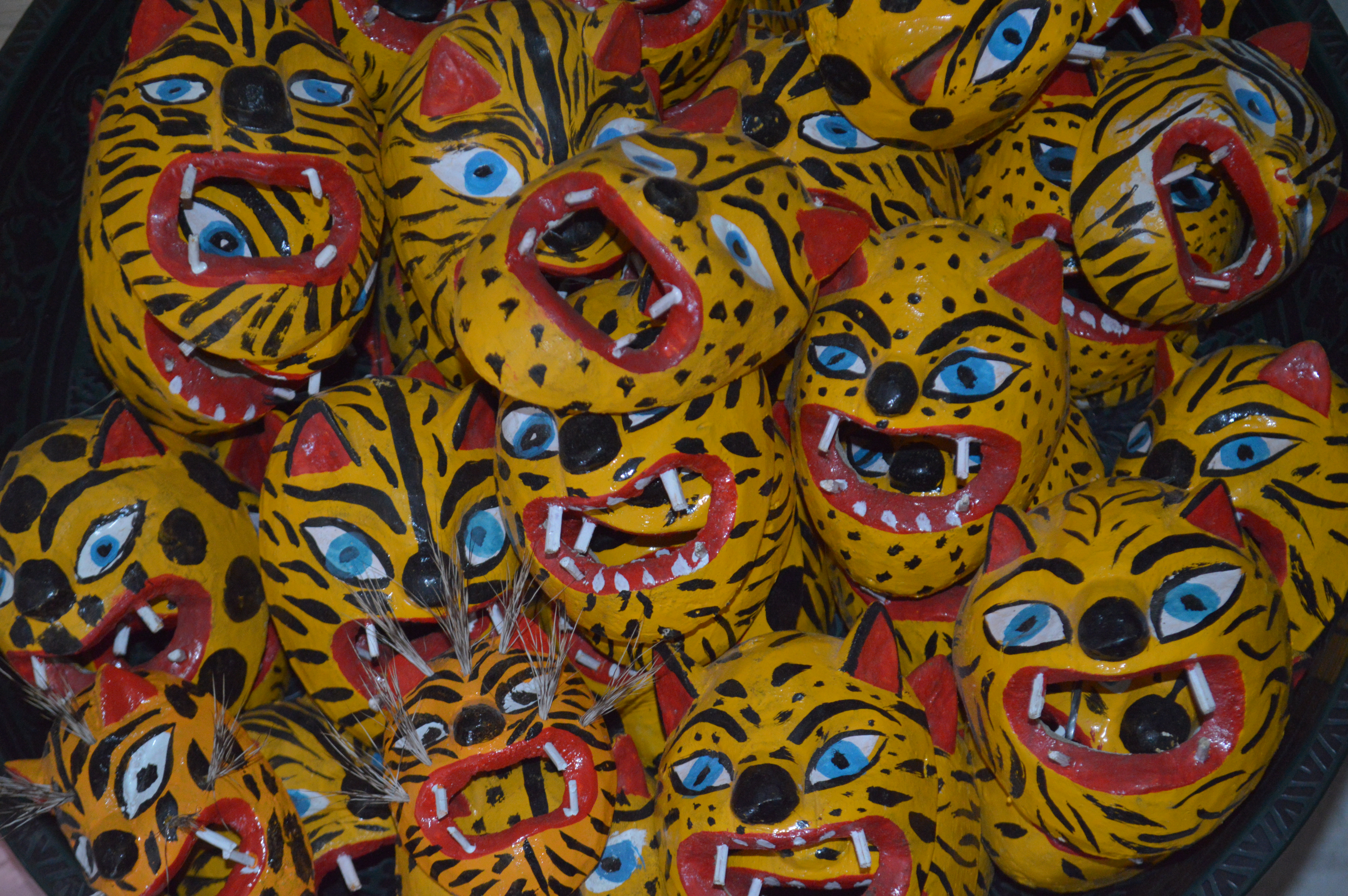 Máscaras de tigre para niños talladas en madera, hechas en un taller de Chilpancingo, frente al complejo Jacarandas.